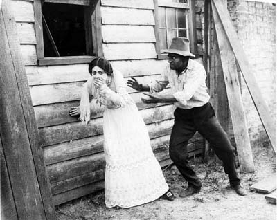 Photo de The Ghost of Twisted Oaks